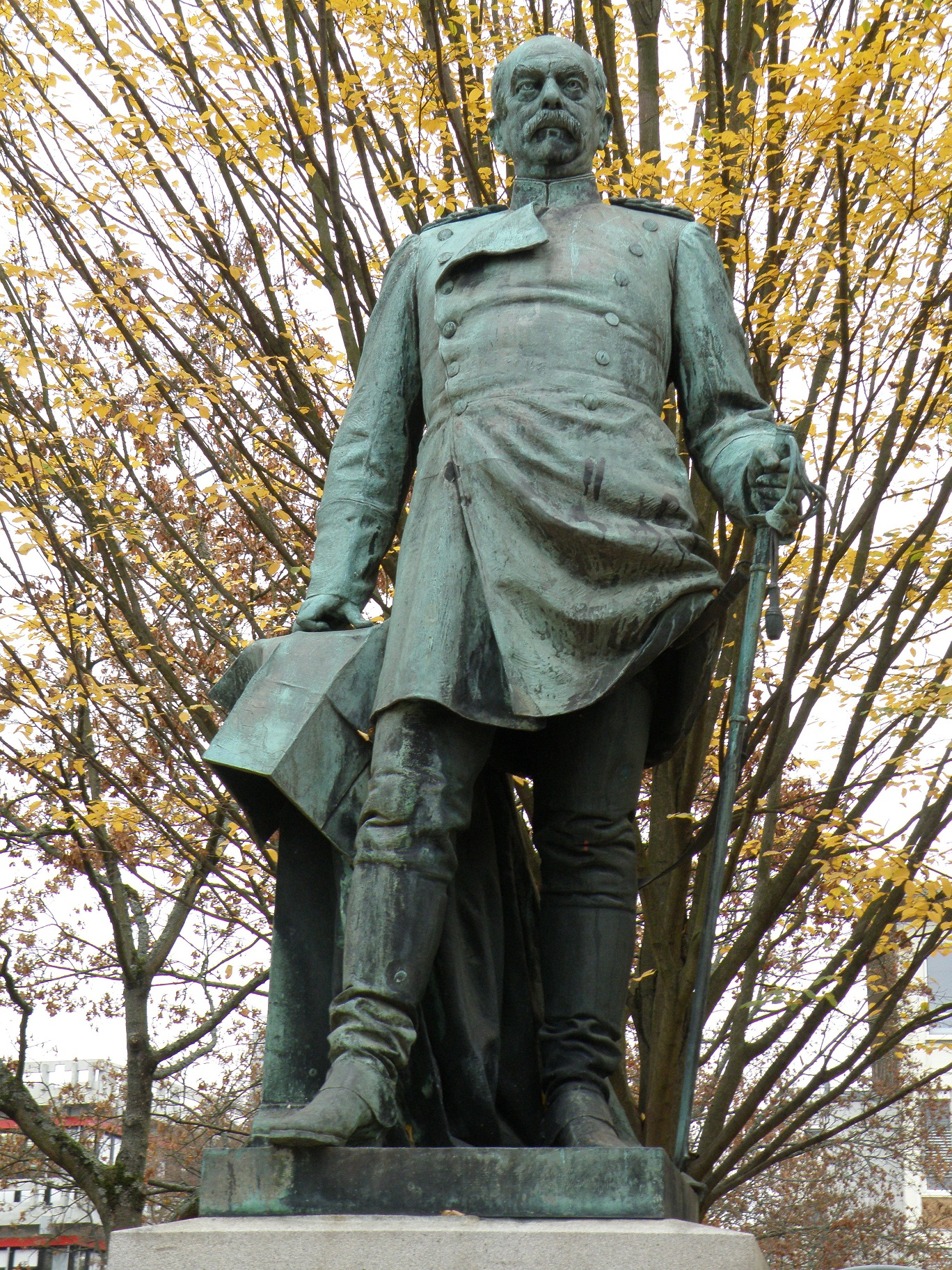 Bismarck-Denkmal in Karlsruhe, Herbst 2011